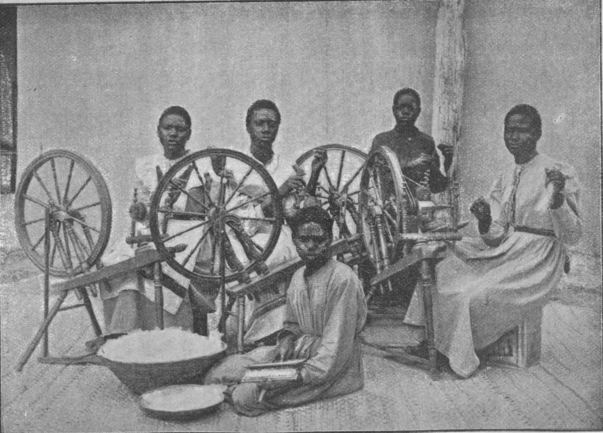 Suomen Lähetysseuran käsityökoulu Ondongassa 1903.